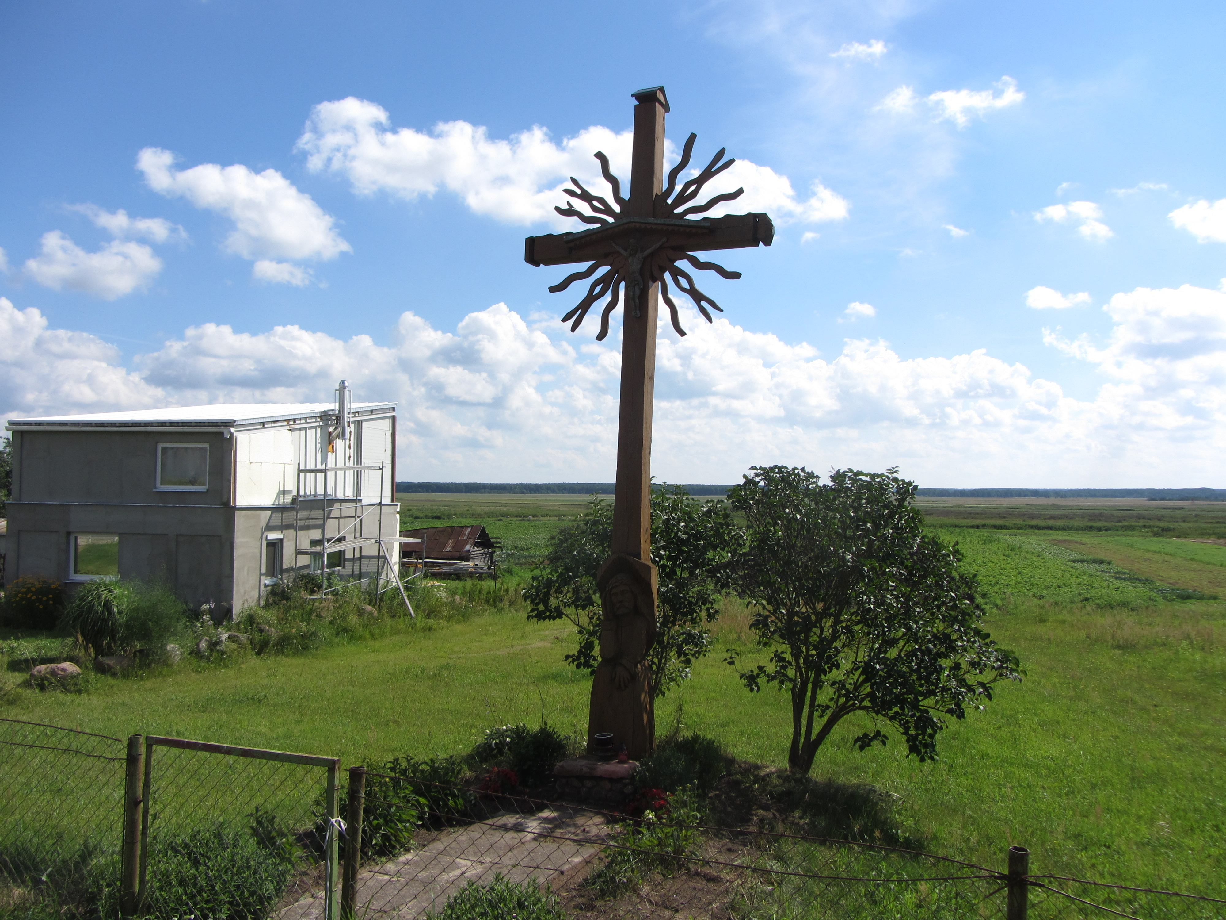 Degsnės, Lithuania